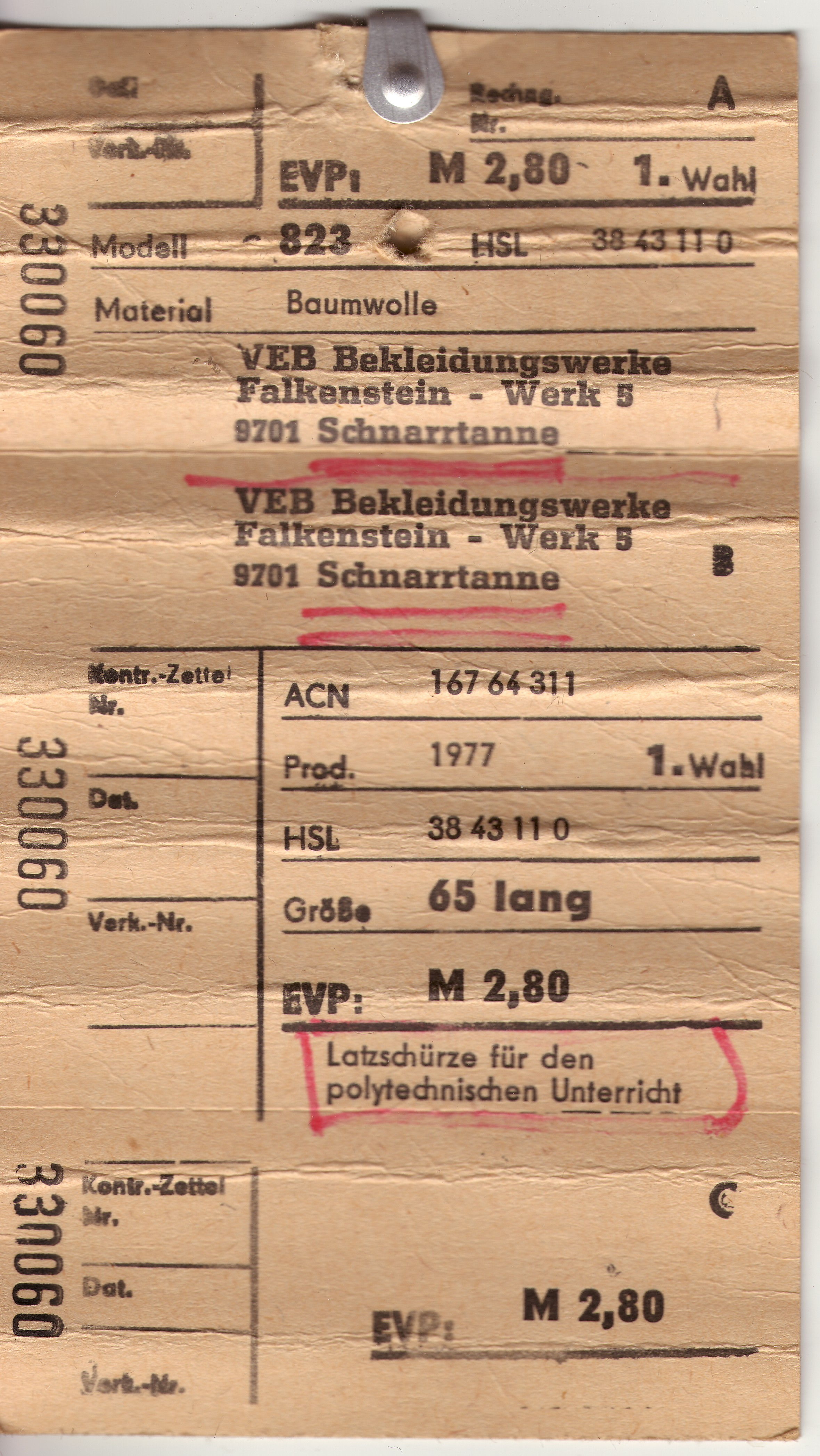 Latzschürze für den polytechnischen Unterricht, in Werk 5 - Schnarrtanne/Vogtland - des VEB Bekleidungswerke Falkenstein/Vogtl. hergestellt im Jahr 1977. EVP - Endverbraucherpreis M 2,80. 65 Zentimeter lang. Qualität: 1. Wahl